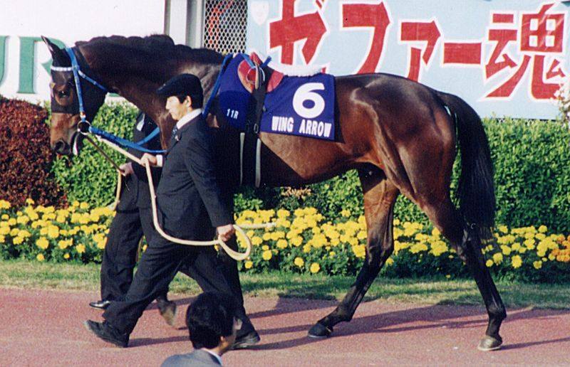 ウイングアロー 撮影日: 2000年11月26日 撮影場所: 東京競馬場 撮影者: Goki